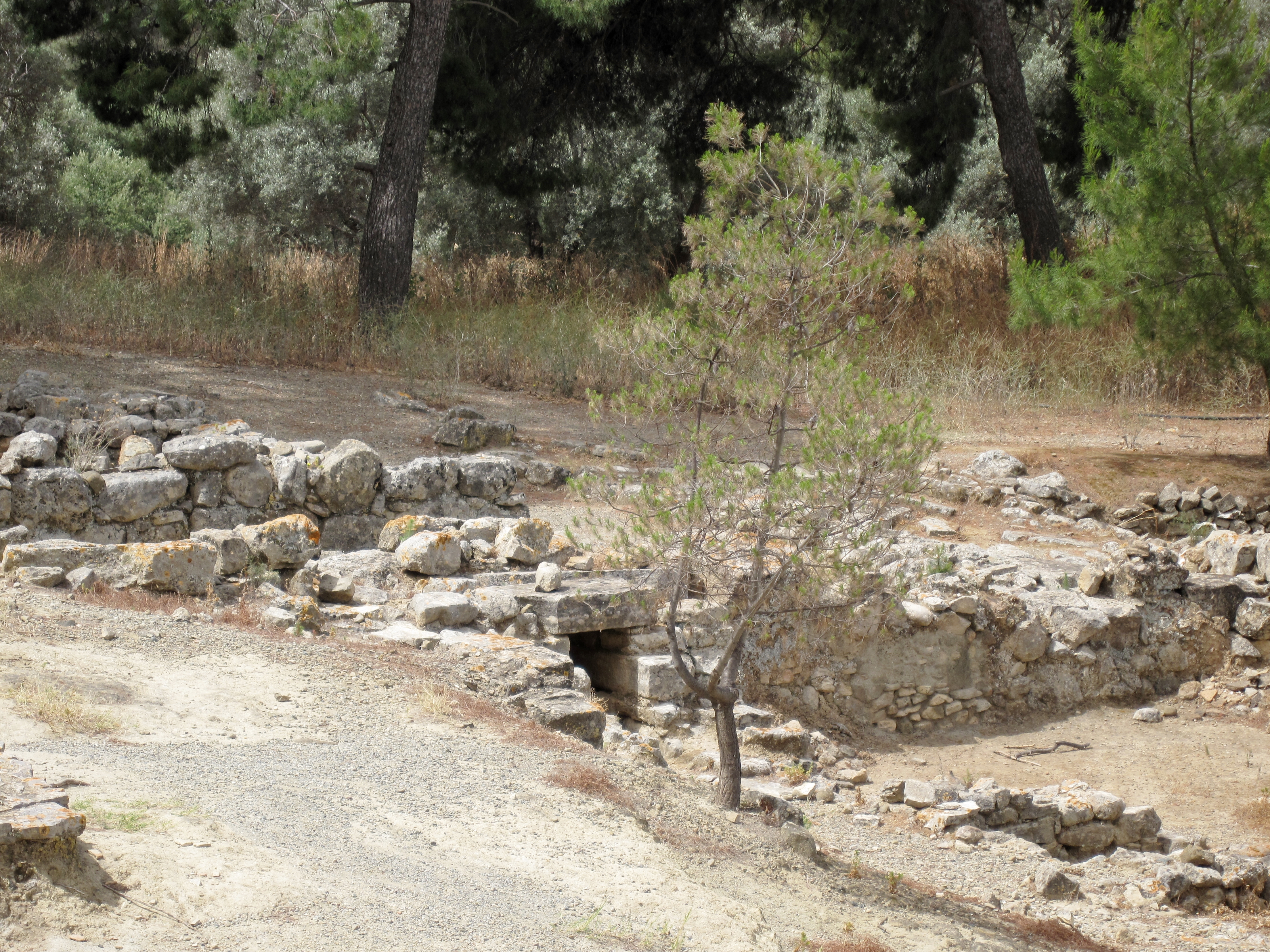 Ausgrabungsstätte von Agia Triada in der Gemeinde Festos, Regionalbezirk Iraklio, Kreta, Griechenland